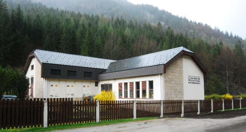 (Wasserleitungs-)Kraftwerk und Schaltzentrale Hinternaßwald an der I. Wiener Hochquellenwasserleitung (leider bei Regen)